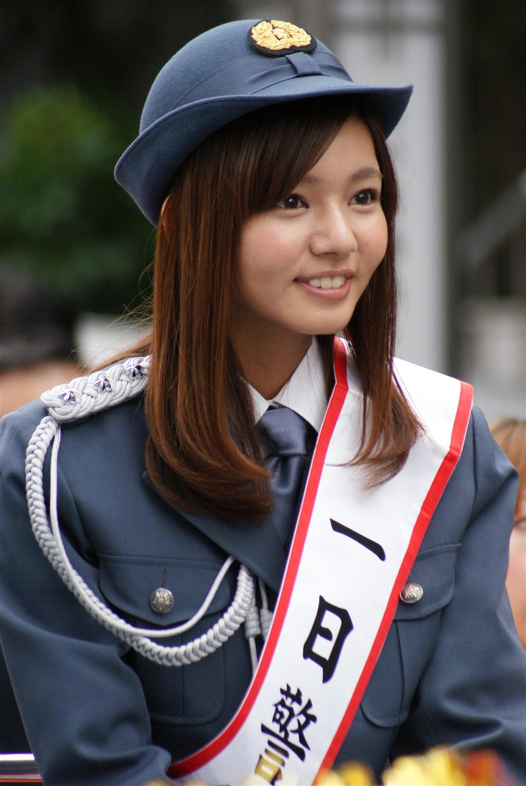 品川警察署一日署長